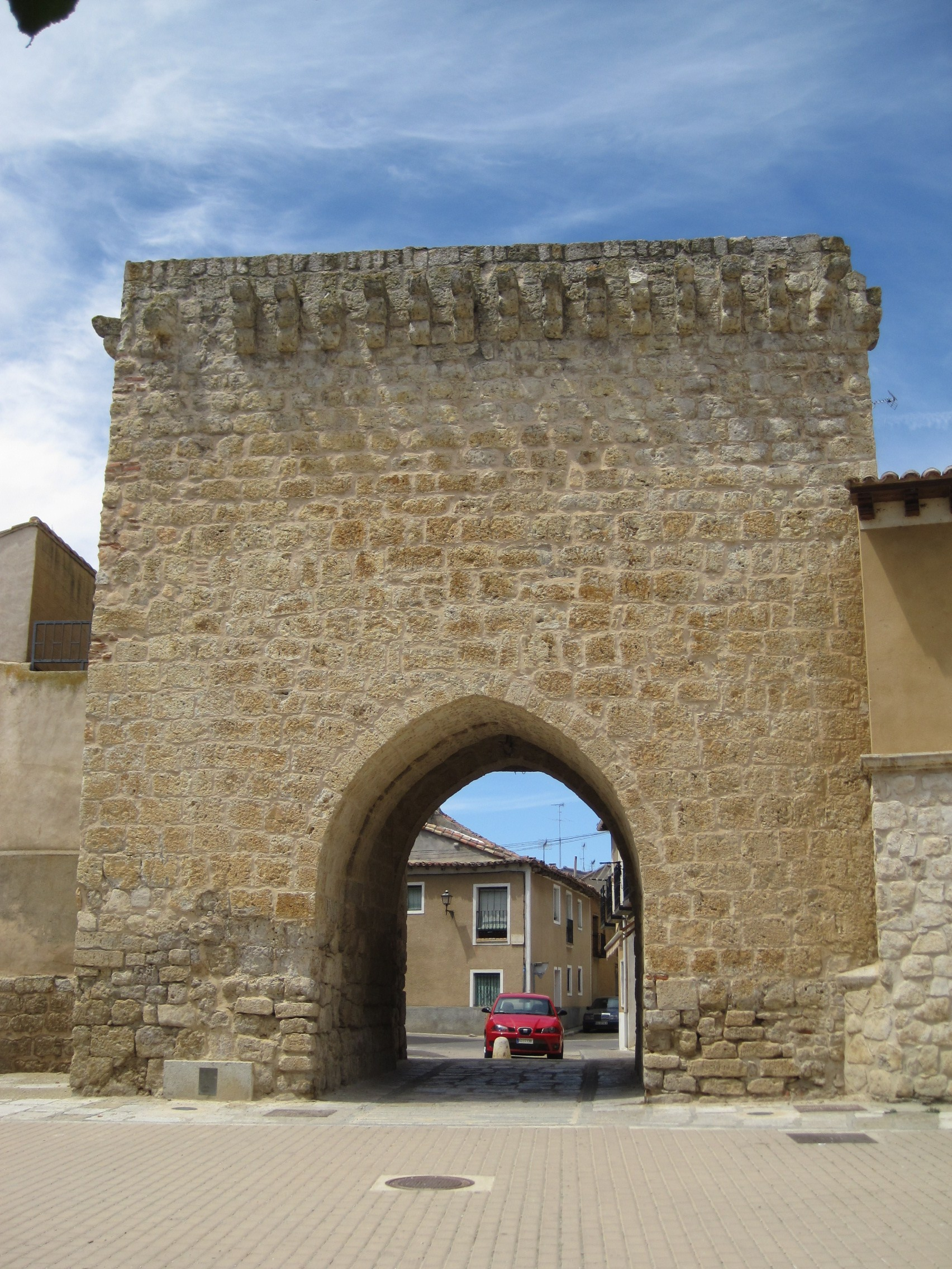 Puerta de Ajújar, perteneciente a la antigua muralla de Medina de Rioseco (Valladolid, España).